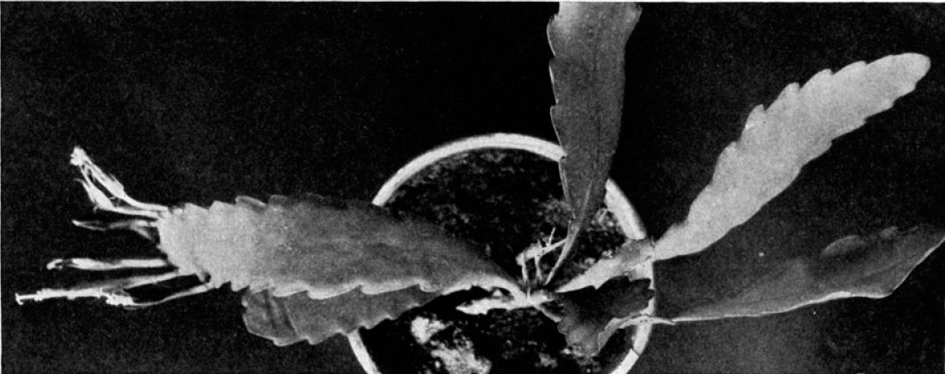 Disocactus eichlamii (Hylocereeae; Cactaceae; Planta) Nathaniel Lord Britton és Joseph Nelson Rose "The Cactaceae" c. könyvéből